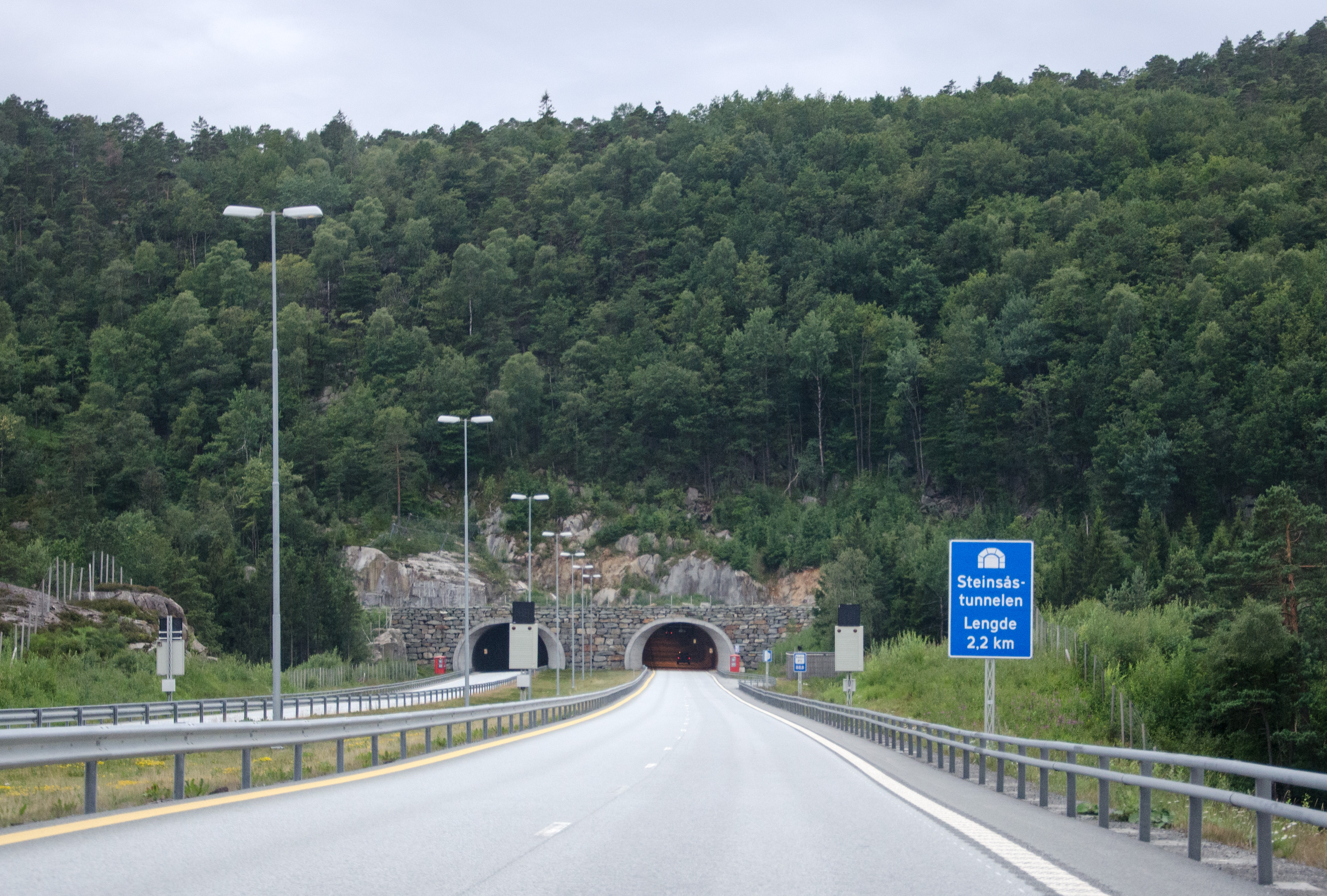 Steinsåstunnelen på E18